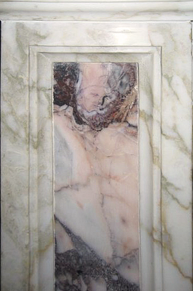 Foto della colonna sinistra dell'altare principale della Chiesa Madre di Nereto (Teramo) dove è apparso il volto del papa Giovanni Paolo II